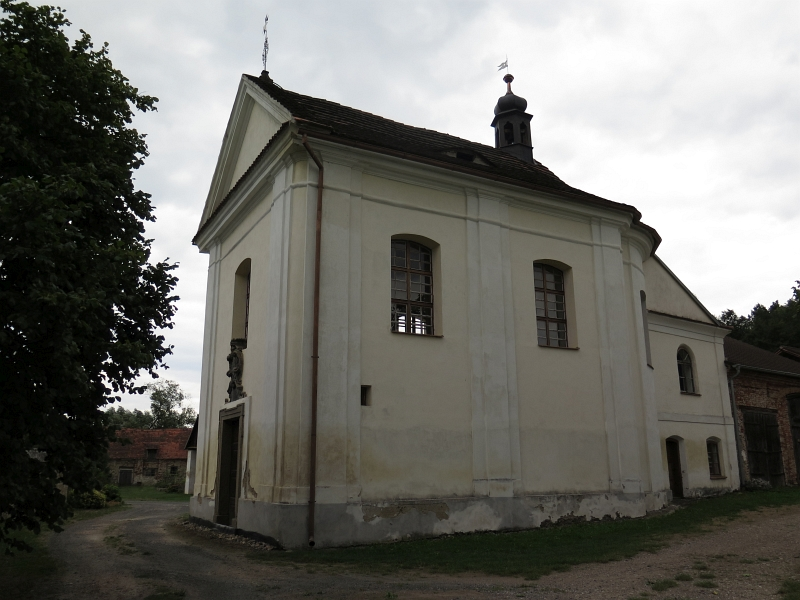 Kaple svaté Apoleny, jihozápadní okraj, Měcholupy (Předslav).